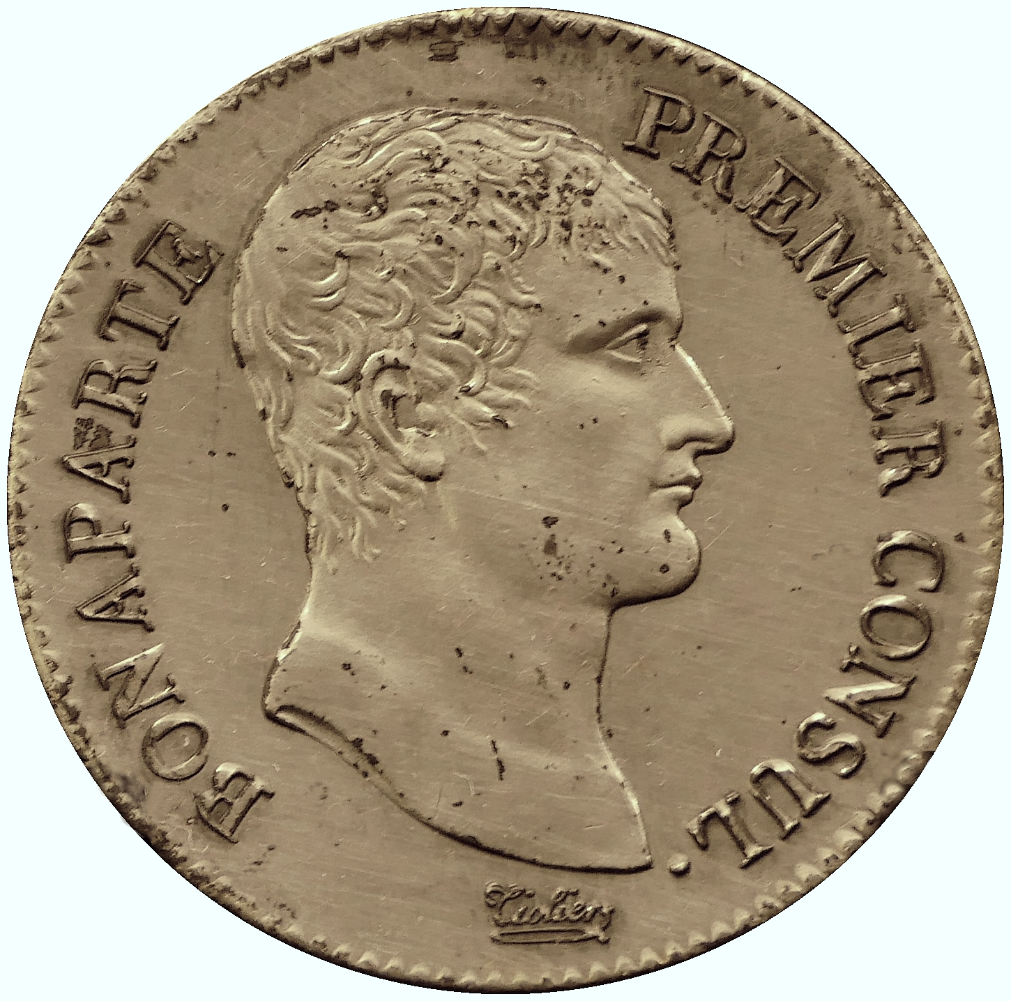 Pièce de 5 francs argent, Bonaparte Ier Consul, (Revers : République Française, an XI A) - 1802-1803, Paris. Gravure de Pierre-Joseph Tiolier. Tirage 3 877 151 exemplaires, diamètre 37 mm, poids 25 gr. argent 900 millièmes. Musée de la Monnaie, 11 quai Conti, Paris. Ref : MON D 000362.